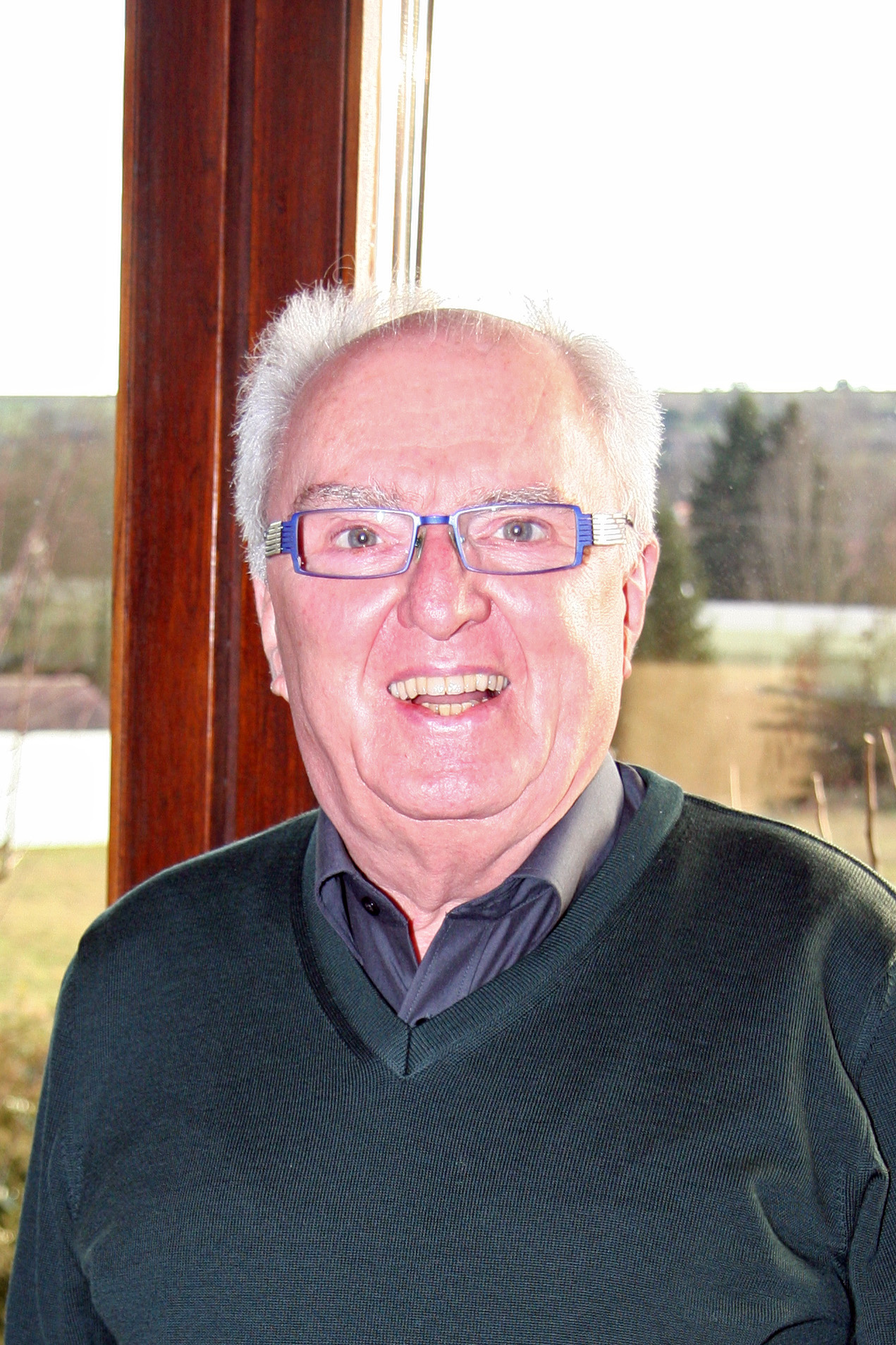 Winfried Scheuermann, ehemaliges Mitglied im Landtag von Baden-Württemberg am 27.12.2013.